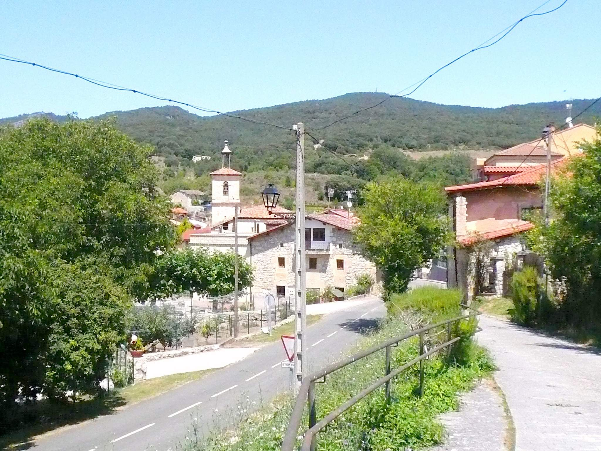 Villanueva de Valdegovía (Álav)